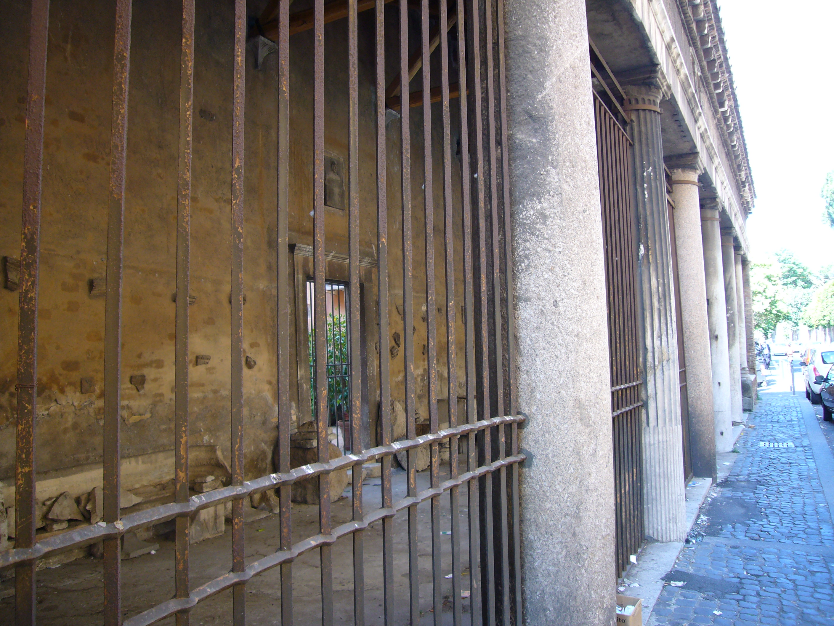 Roma, via di s. Stefano rotondo. Portico del vecchio ospedale del Salvatore, allora intitolato a san Michele